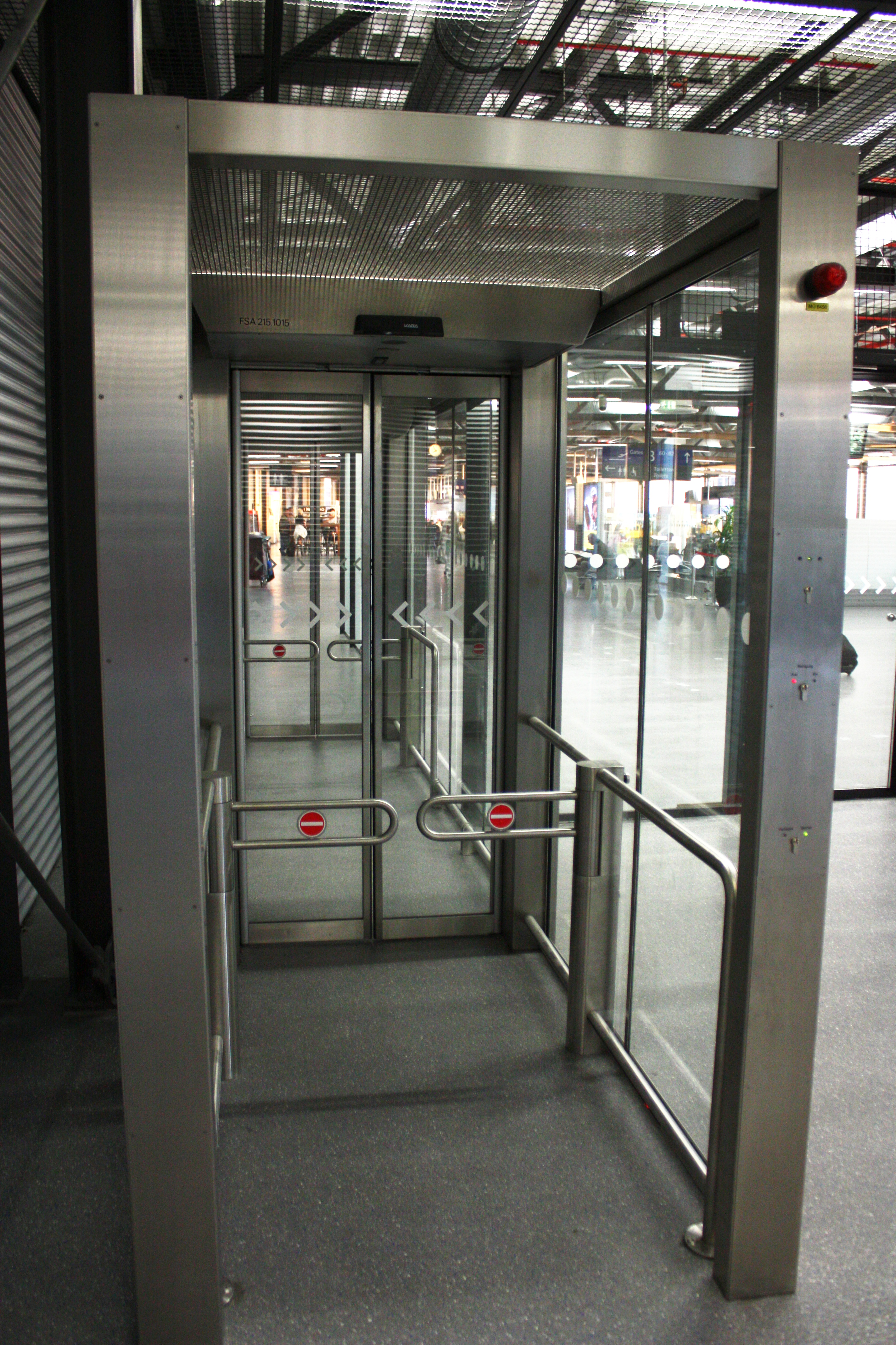 Sicherheitsschleuse; Vereinzelungsschleuse; Flughafen Frankfurt Main